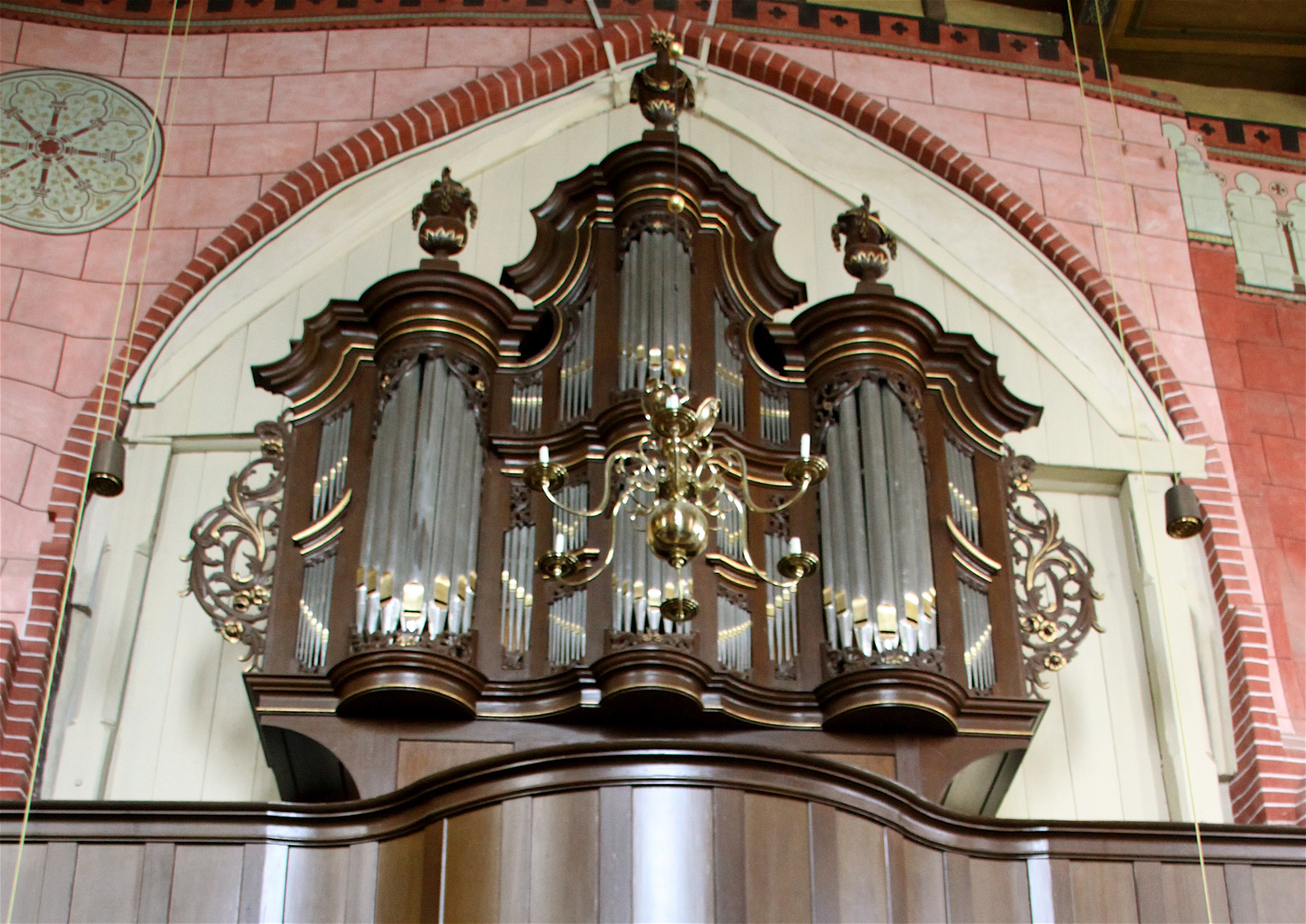 Kirchenorgel Reepsholt